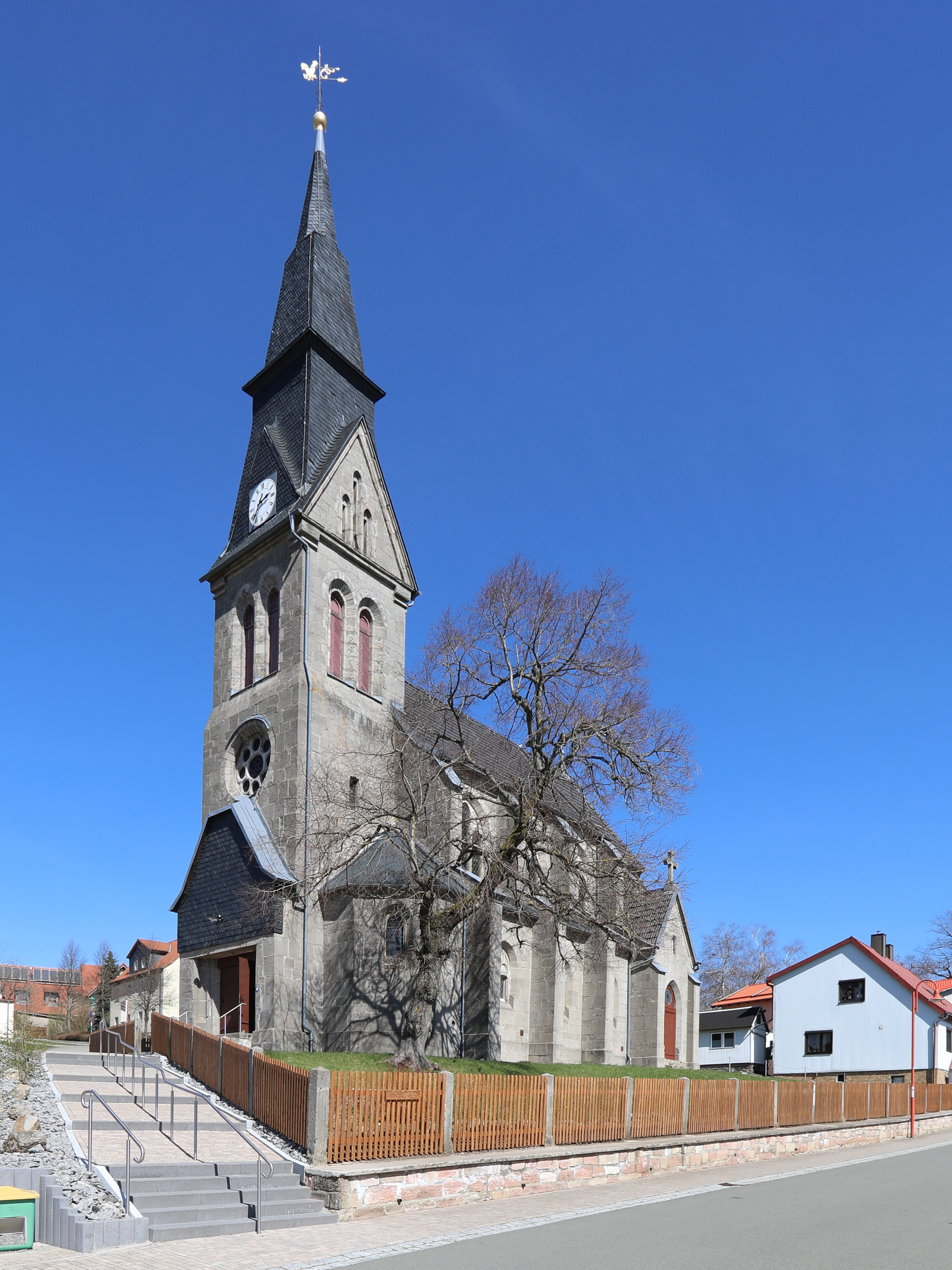 evangelisch-lutherische Kirche St. Peter und Paul in Frankenheim